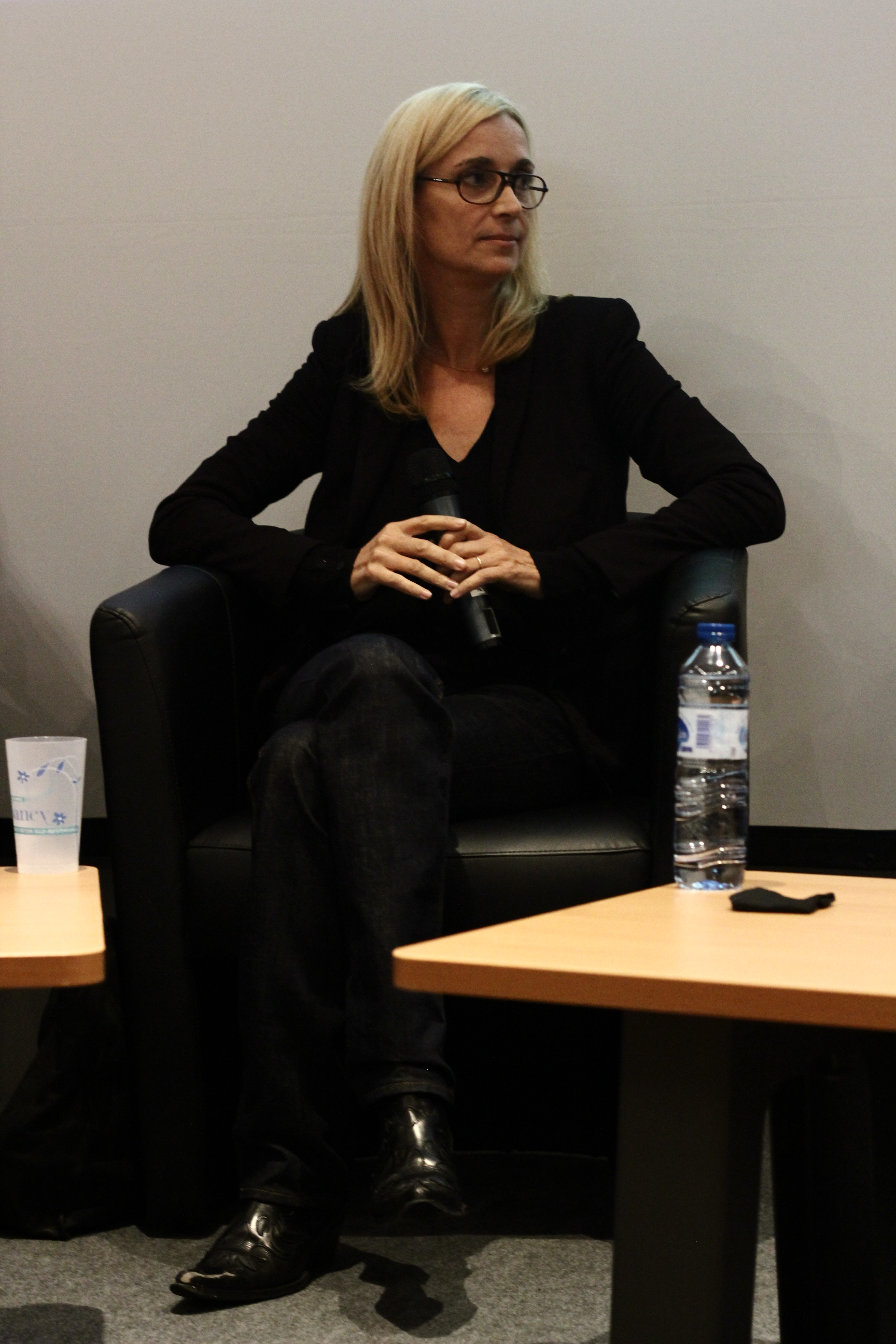 Valérie Tong Cuong, au Livre sur la Place de Nancy 2013